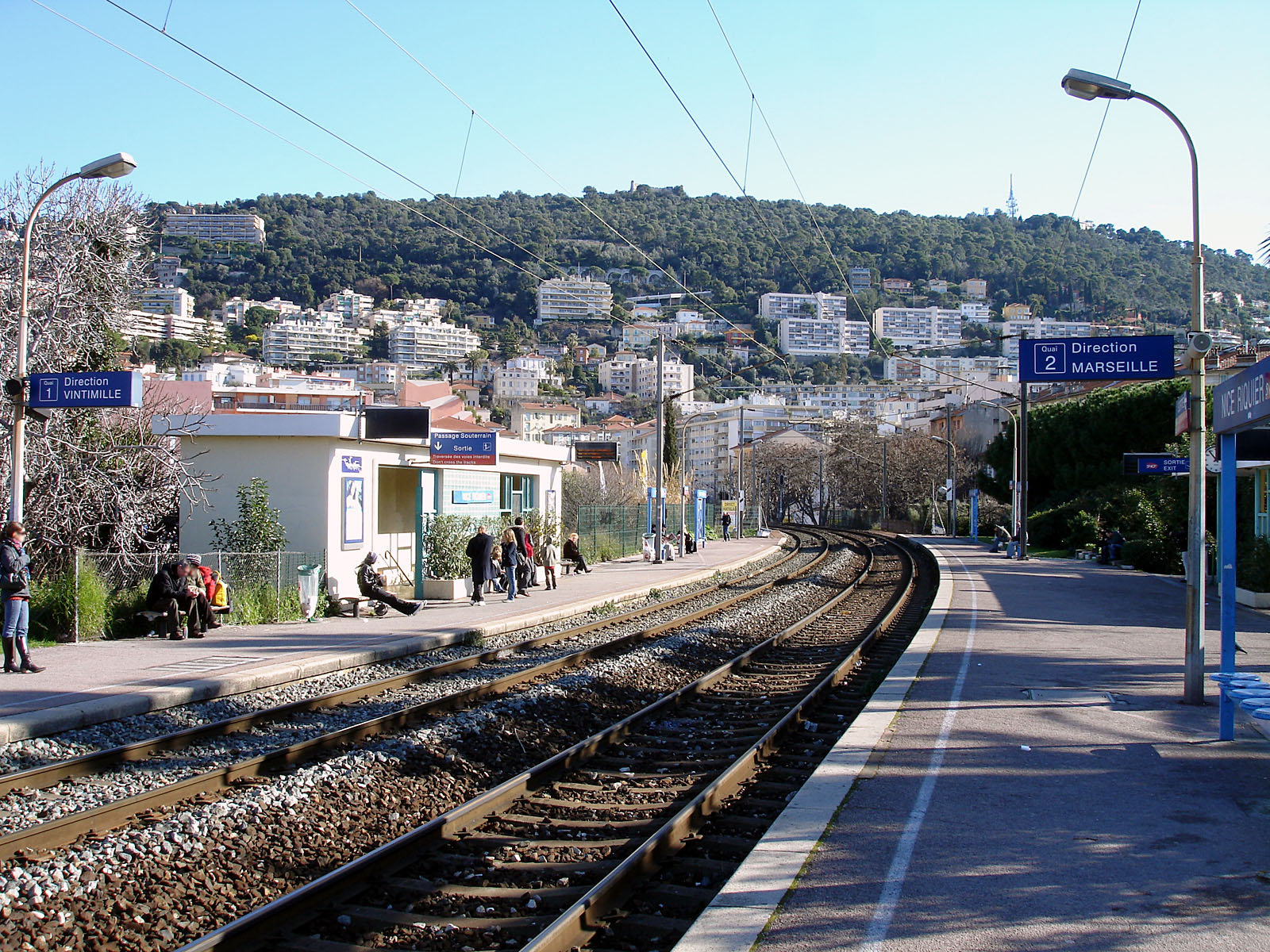 La gare de Nice-Riquier (Alpes-Maritimes), France.